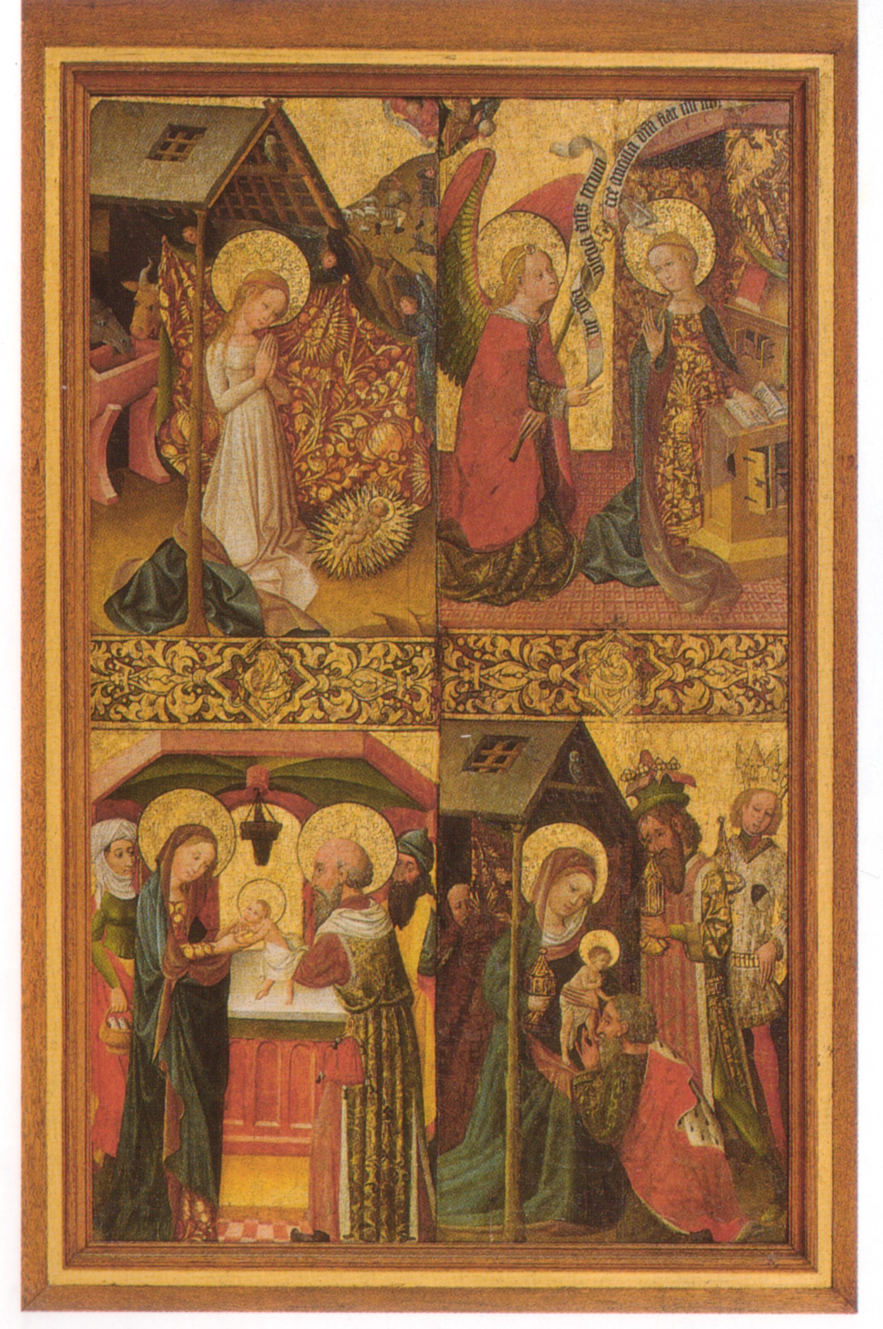 Marienaltar, Rostock, Marienkirche